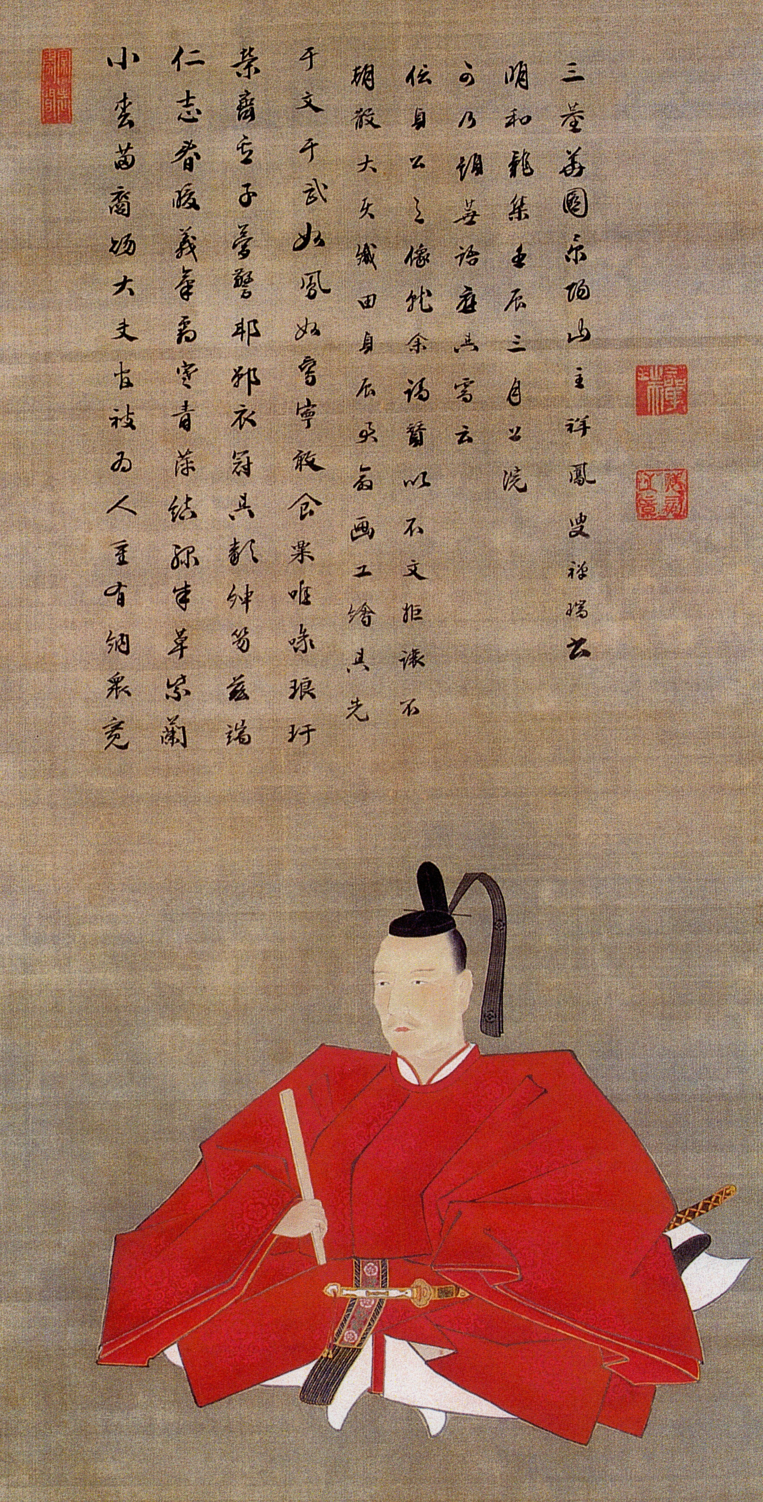 織田信貞の肖像。